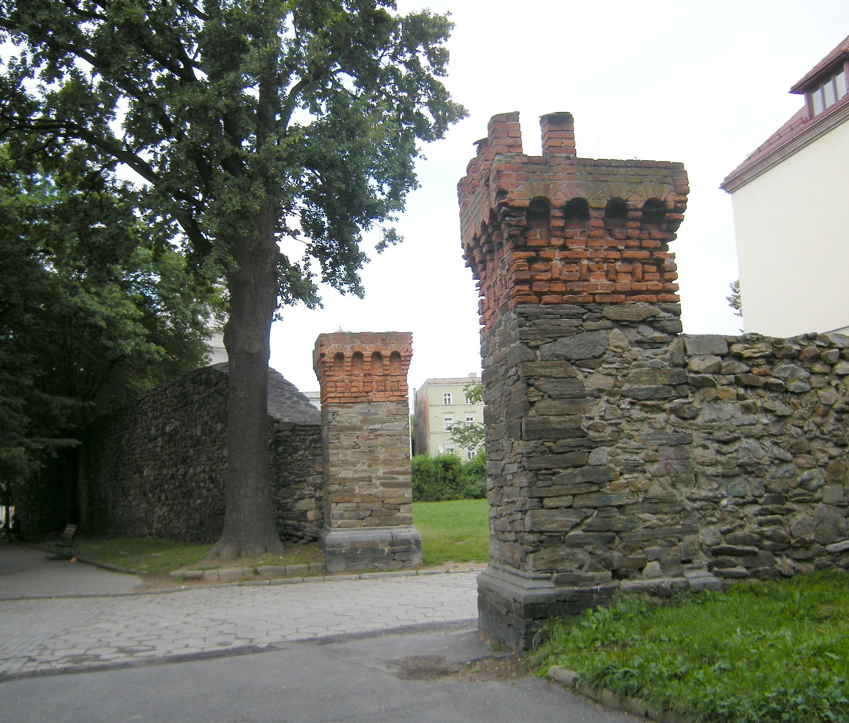 Mury obronne w Paczkowie